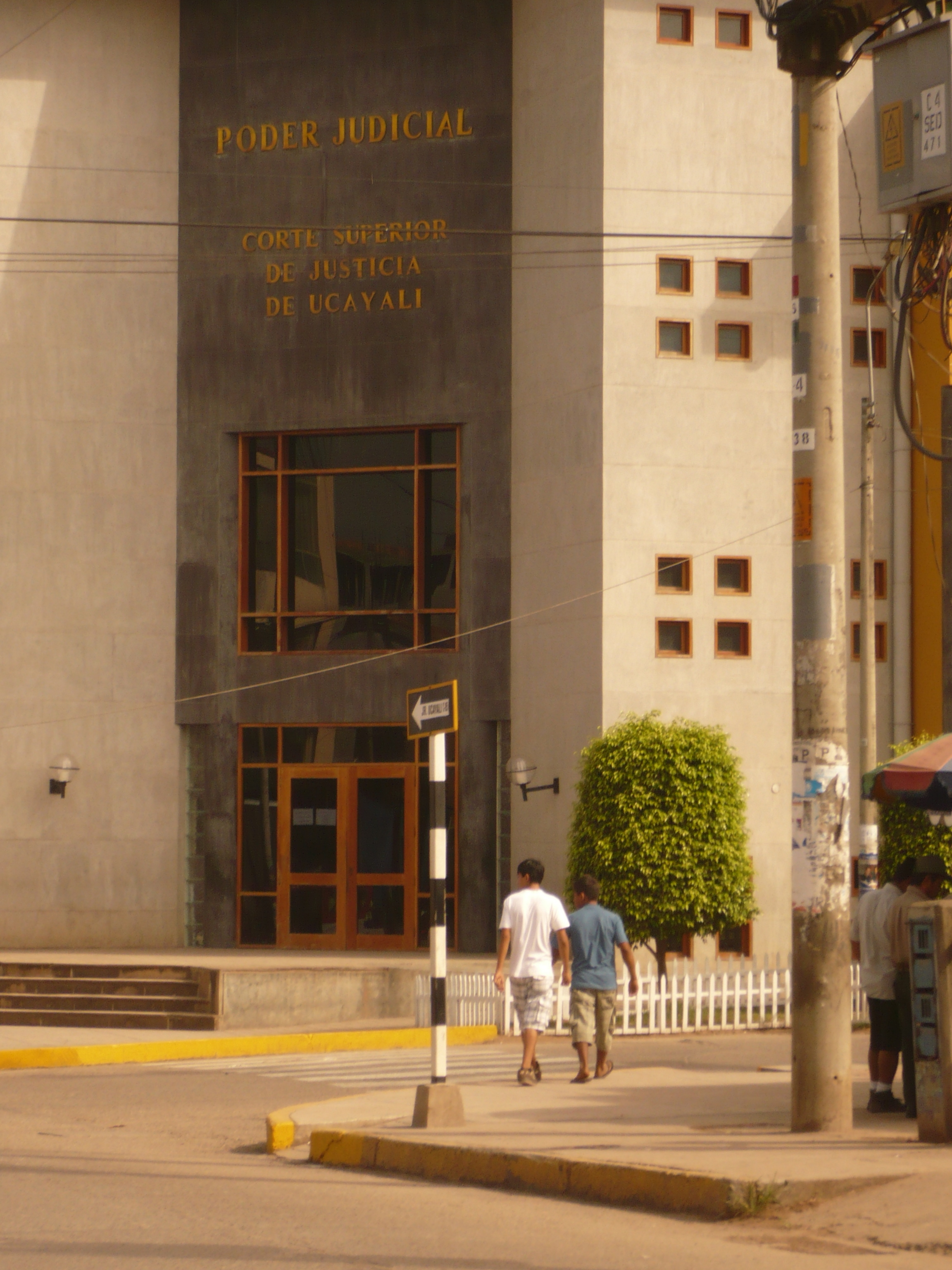 Sede central de la corte de justicia de Ucayali (distrito judicial de Ucayali).